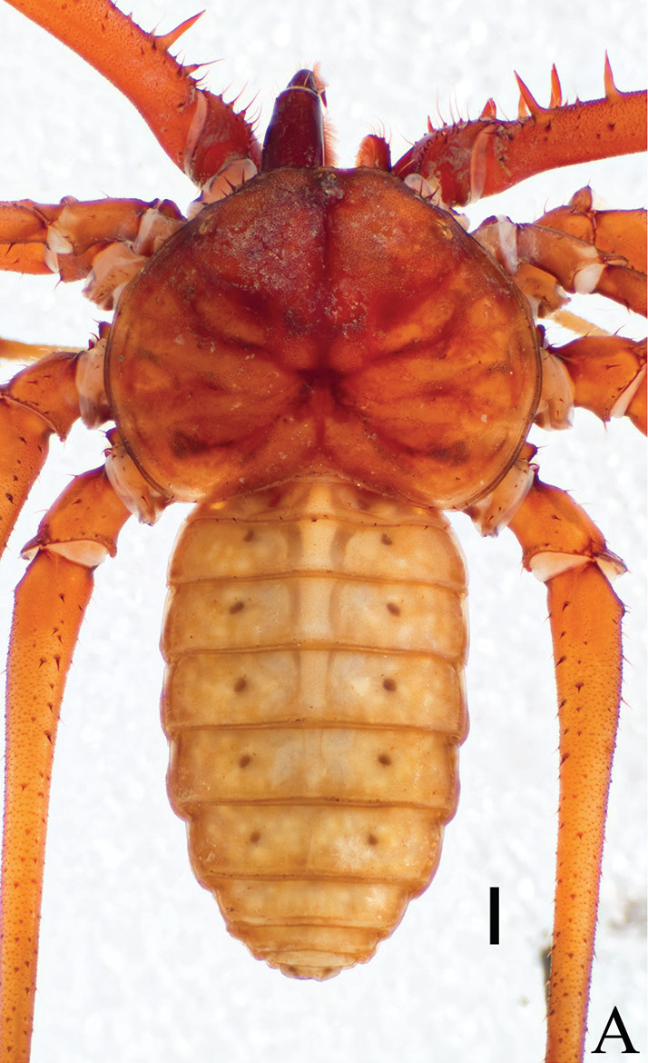 Vista dorsal de Sarax timorensis